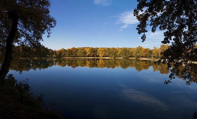 Der Herthasee bei Holzappel in Rheinland-Pfalz